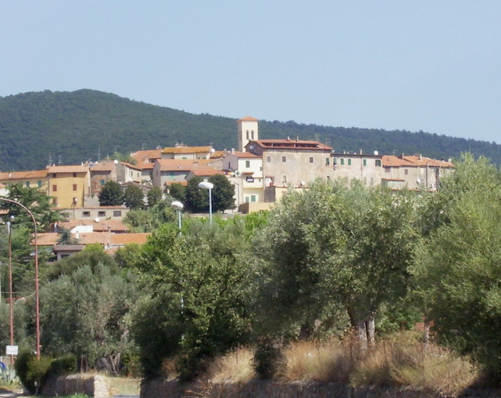 Facciata della Chiesa Confraternita di San Giuseppe a Batignano (GR)